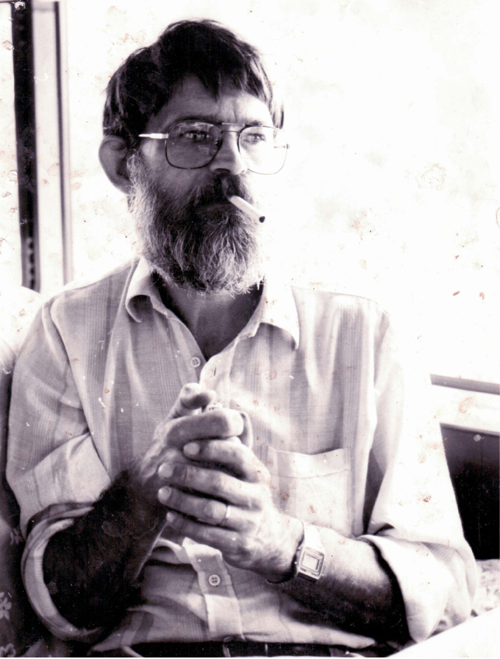 Manfred Beelke (1939–2009) im Atelier, Berlin